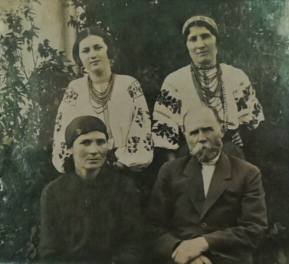 P.P.Mershchiy with family, 1926